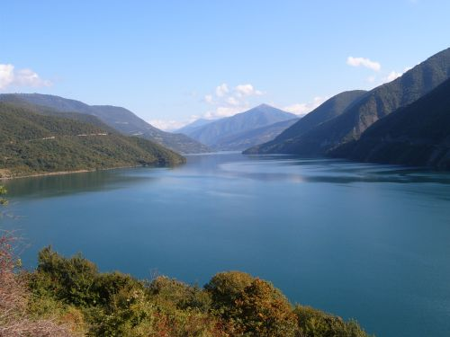 Zhinvali Reservoir on Araghvi river